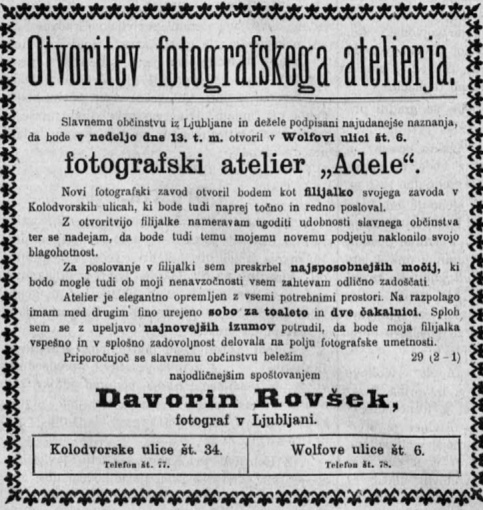 Otvoritev fotografskega ateliera Adele.